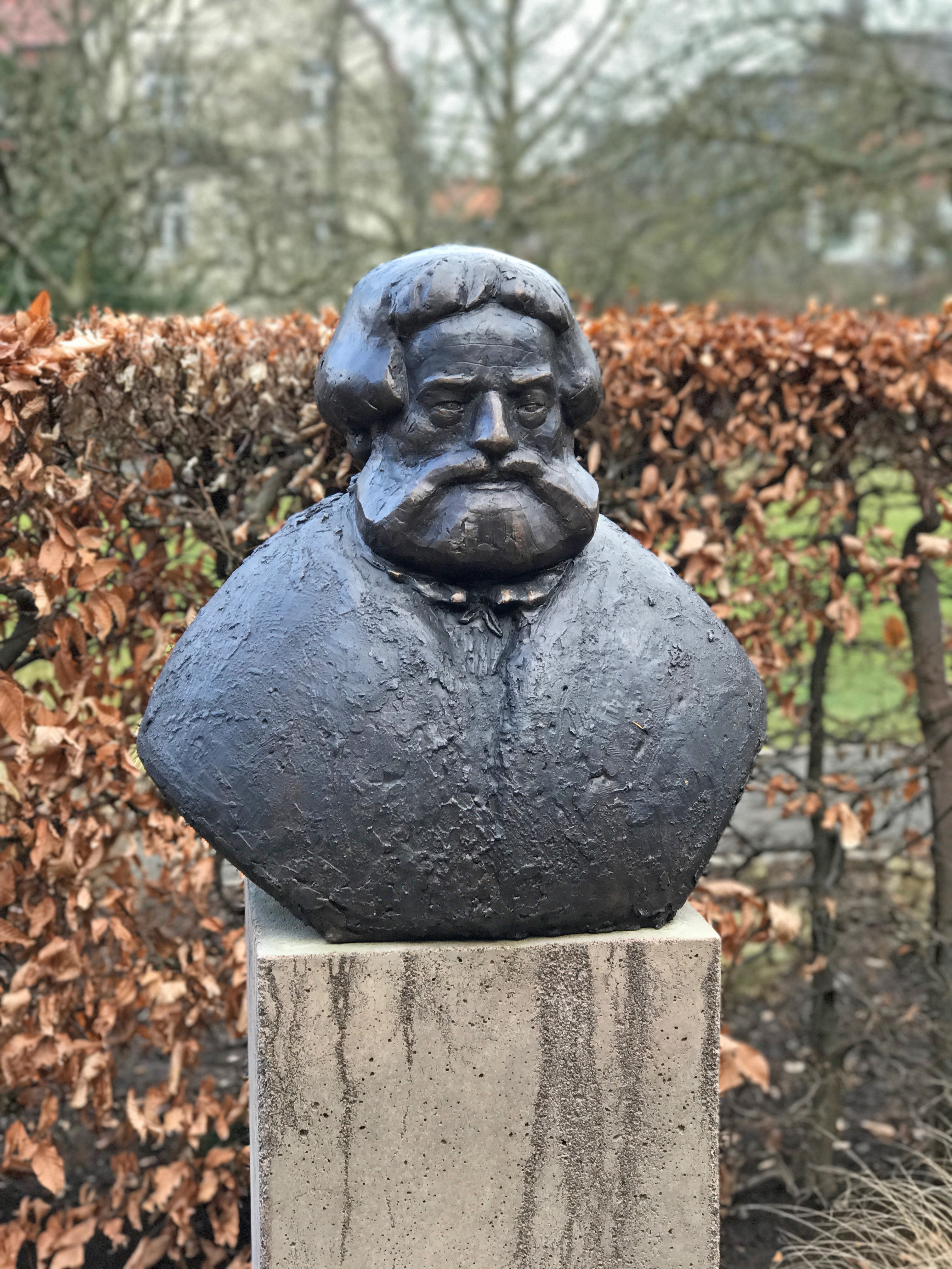 Büste von Michael Meyenburg am "Kunsthaus Meyenburg" in Nordhausen, enthüllt im September 2016